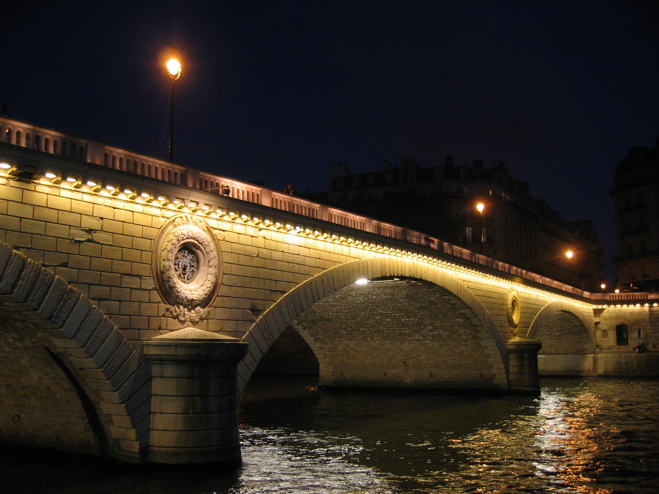 Photo du Pont Louis-Philippe de nuit.